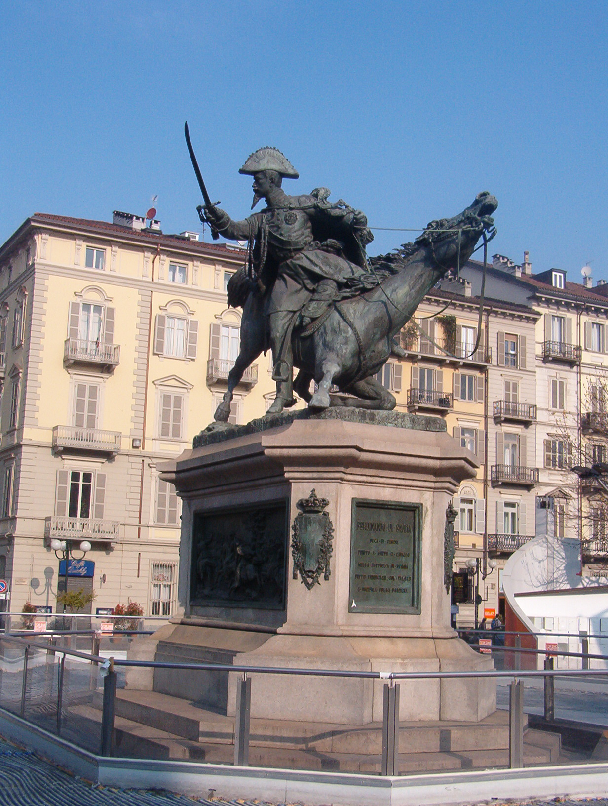 Alfonso Balzico (1825-1901), Statua di Ferdinando di Savoia, Duca di Genova (1877), in Piazza Solferino - Torino - Italia.